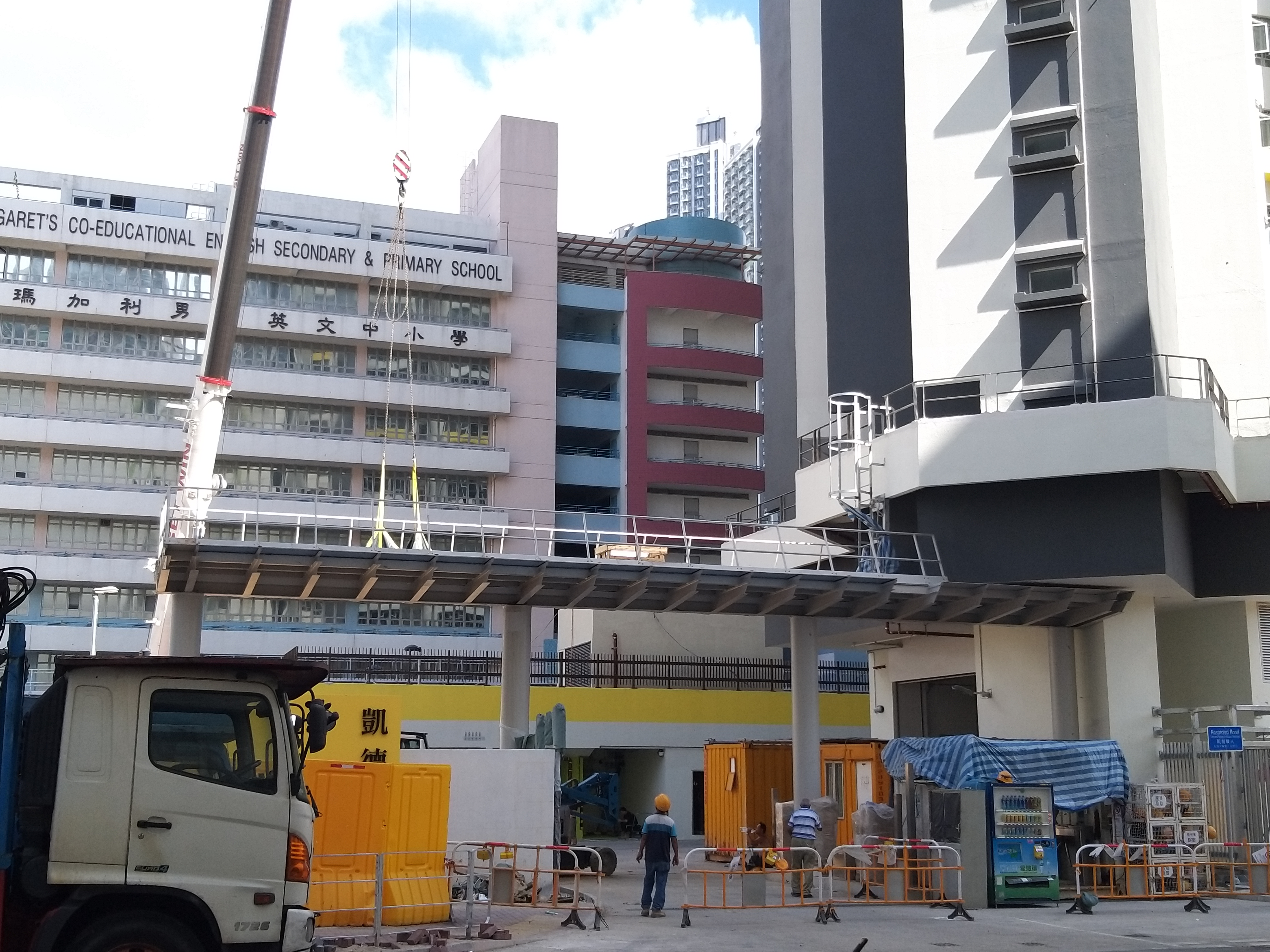 已裝閘機，而左方屋苑名稱已經裝妥